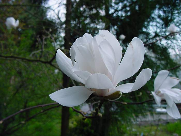 Magnolia × loebneri 'Merril'